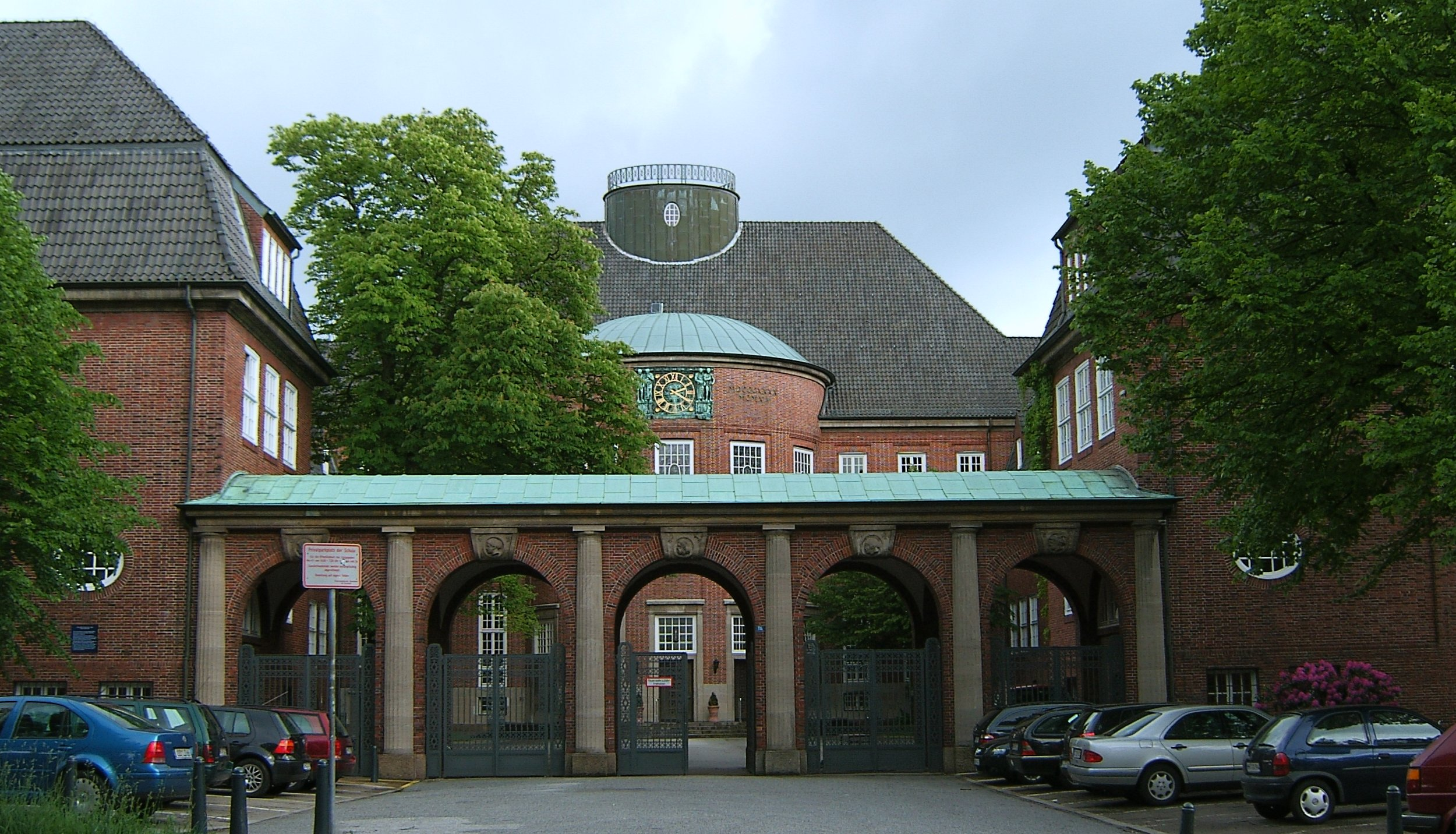 Hamburg, Winterhude, Johanneum